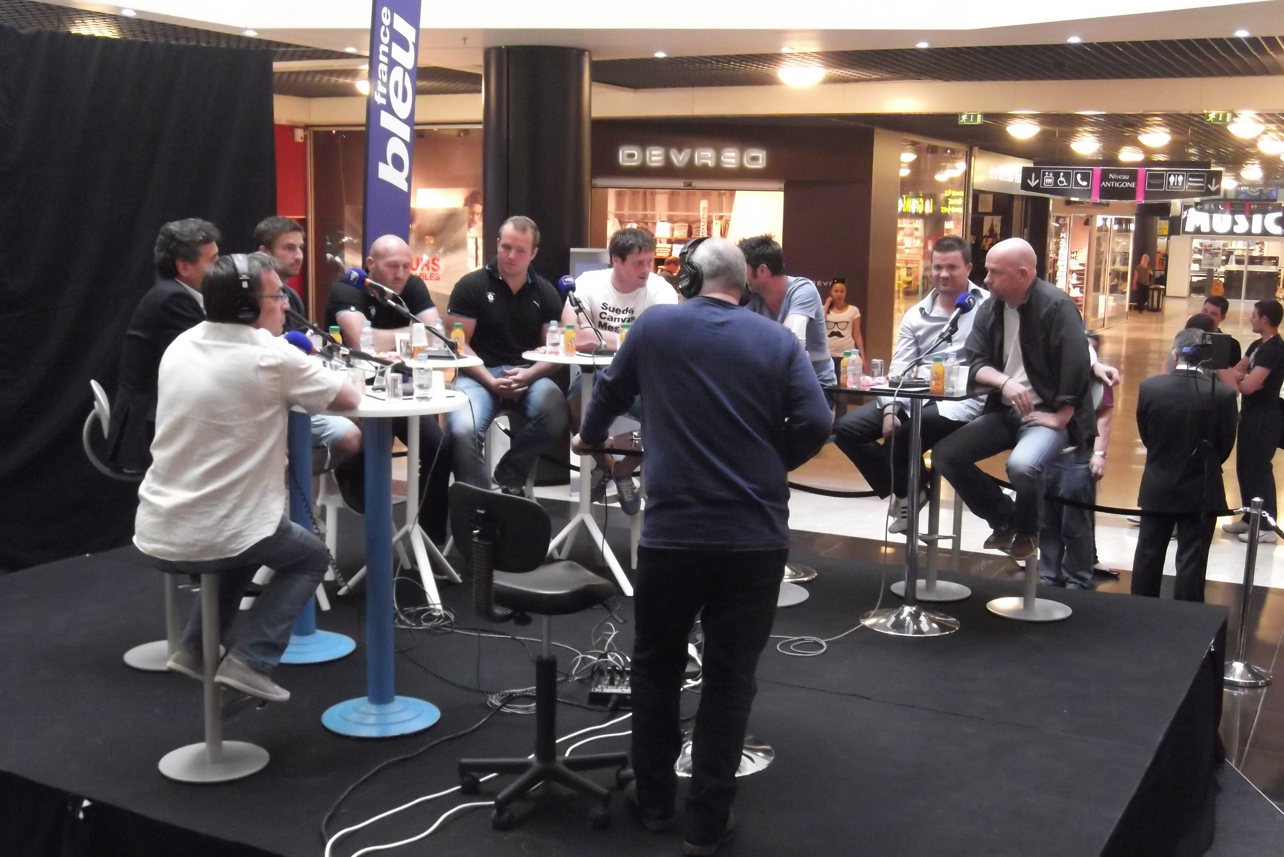 Enregistrement public de l'émission radio "club Sers" (France Bleu Hérault) animé par Philippe Sers, avec le président du MHR, Mohed Altrad et les rugbymen du MHR.